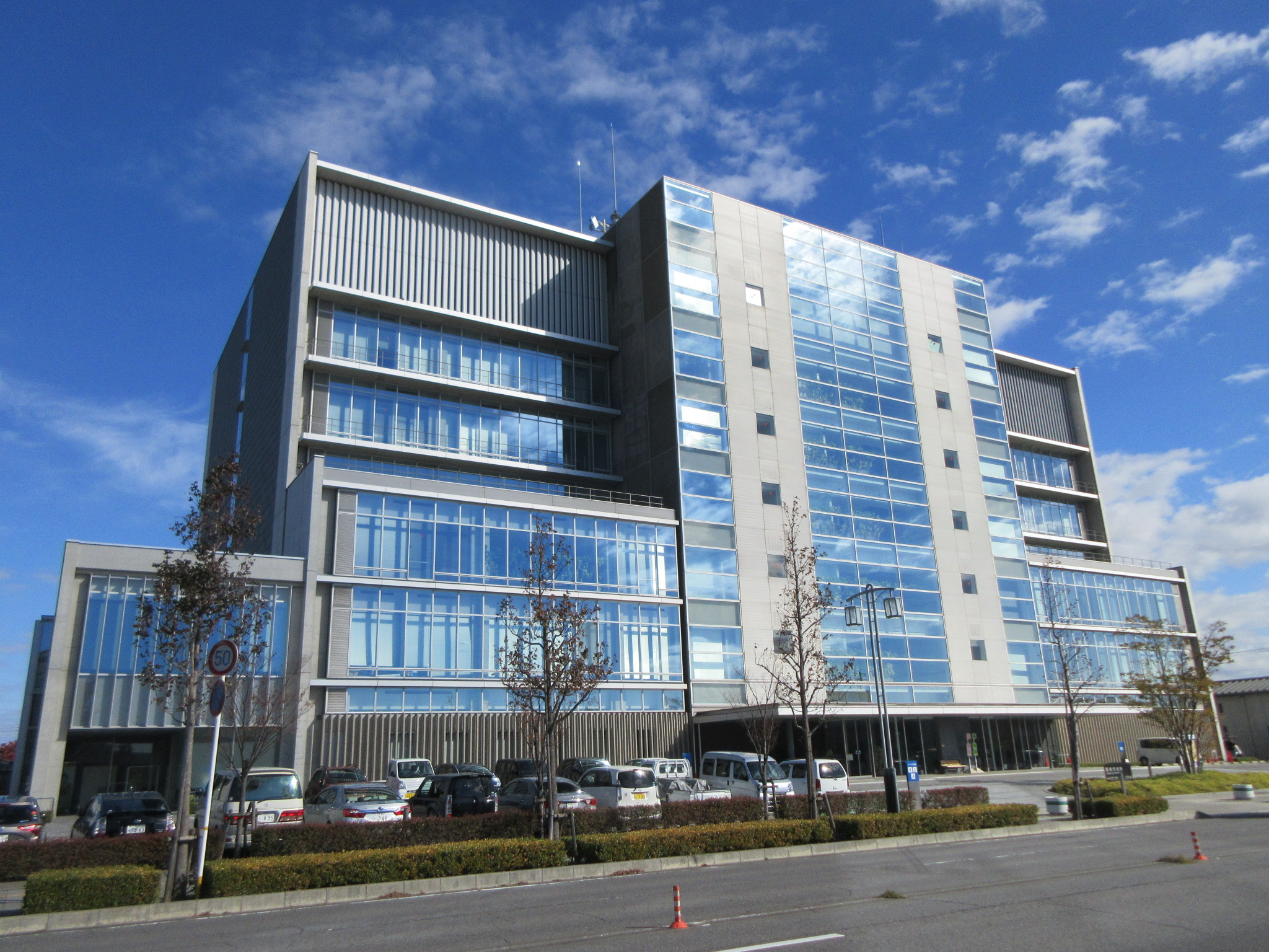 西尾市役所（西尾市寄住町）